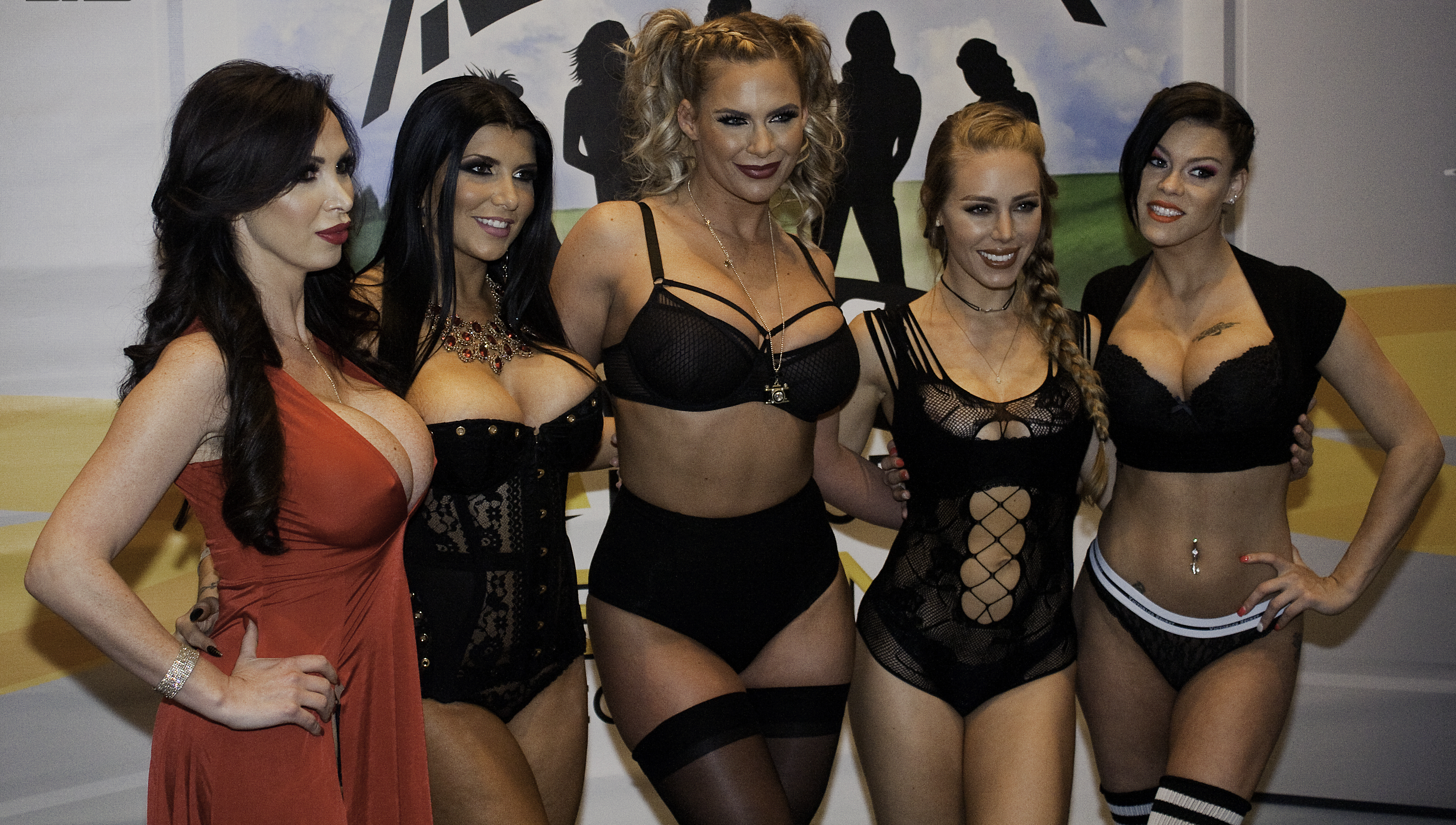 AEE16_0019bas